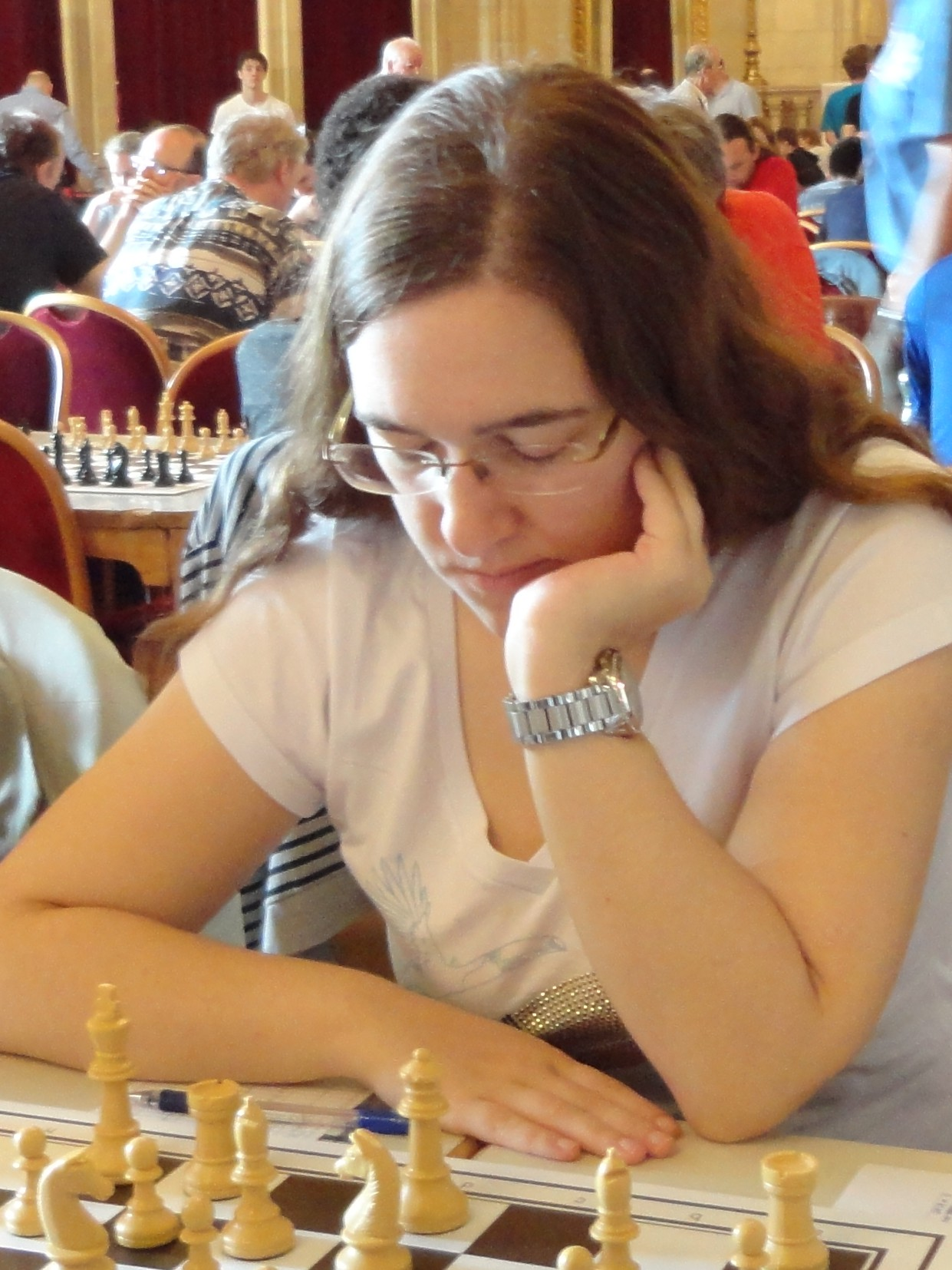 Katharina Newrkla, Vienna Chess Open 2015 in Wien.